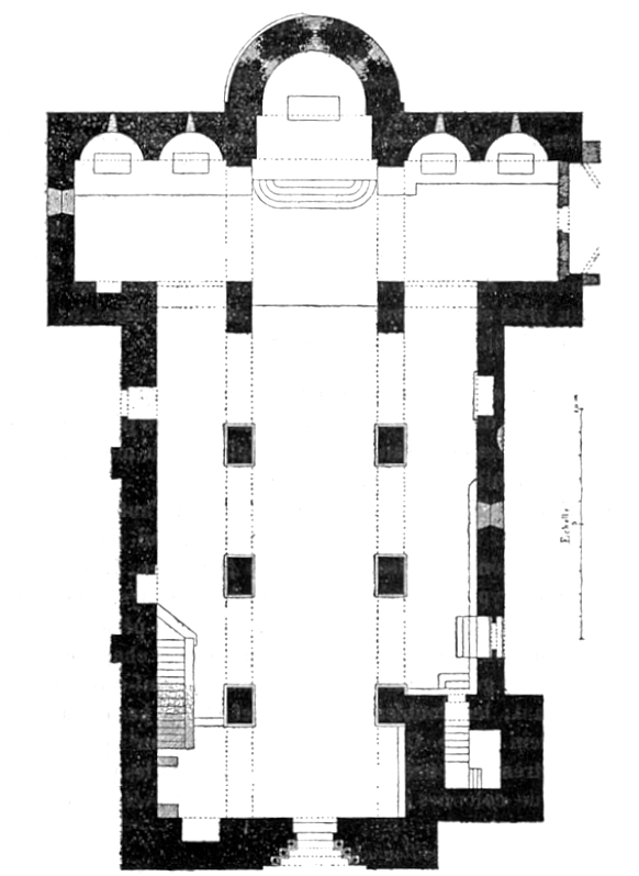 Plan de l'église collégiale de Corneilla-de-Conflent par Jean-Auguste Brutails